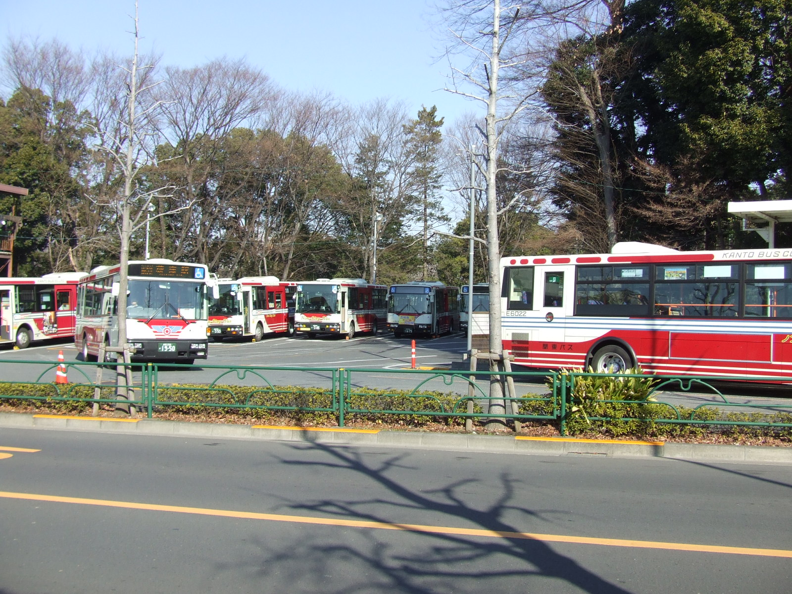 関東バス五日市街道営業所。(五日市街道上り方向)。駐車場は大きいが、事務所は簡素な小屋があるだけである。